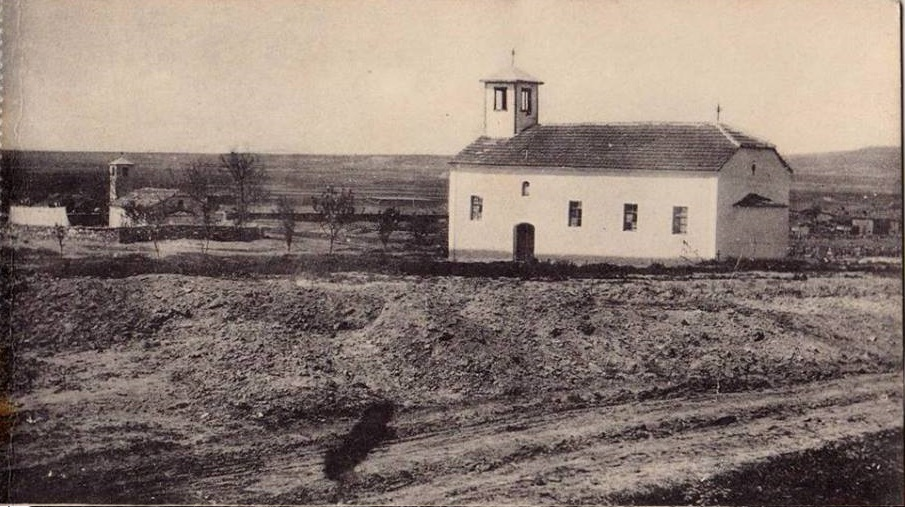 Црквата „Рождество на Пресвета Богородица“ во битолско Бач